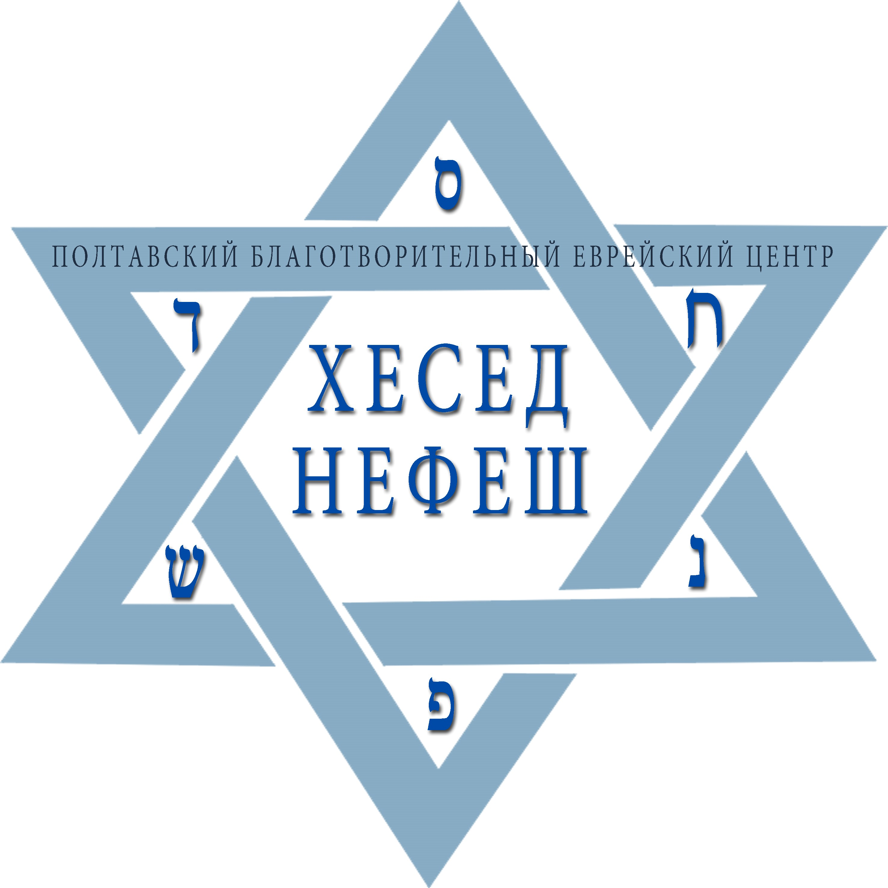 Емблема організації